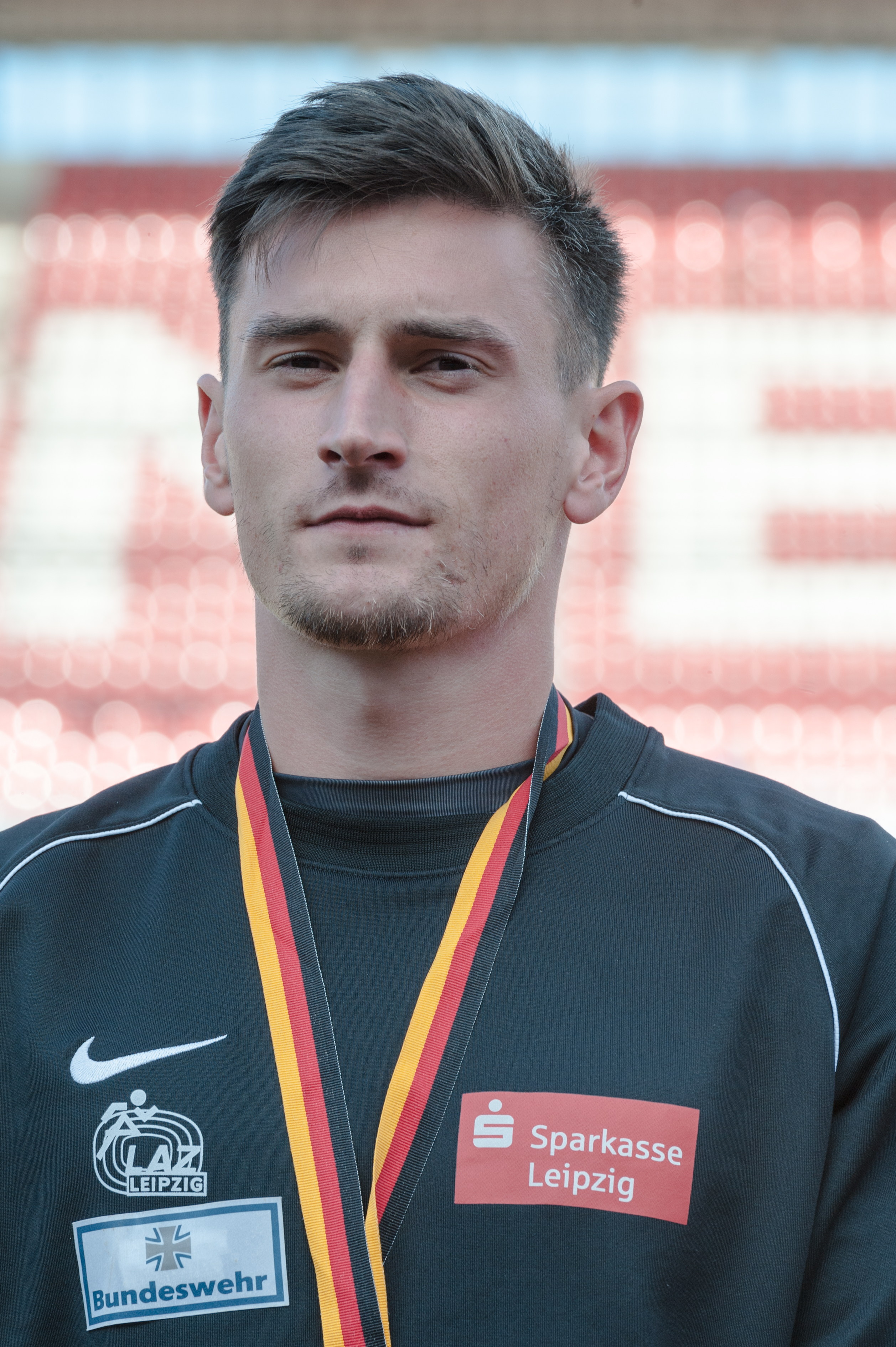 Deutsche Leichtathletik-Meisterschaften 2015: Männer 200m - Robert Hering, SC DHFK Leipzig